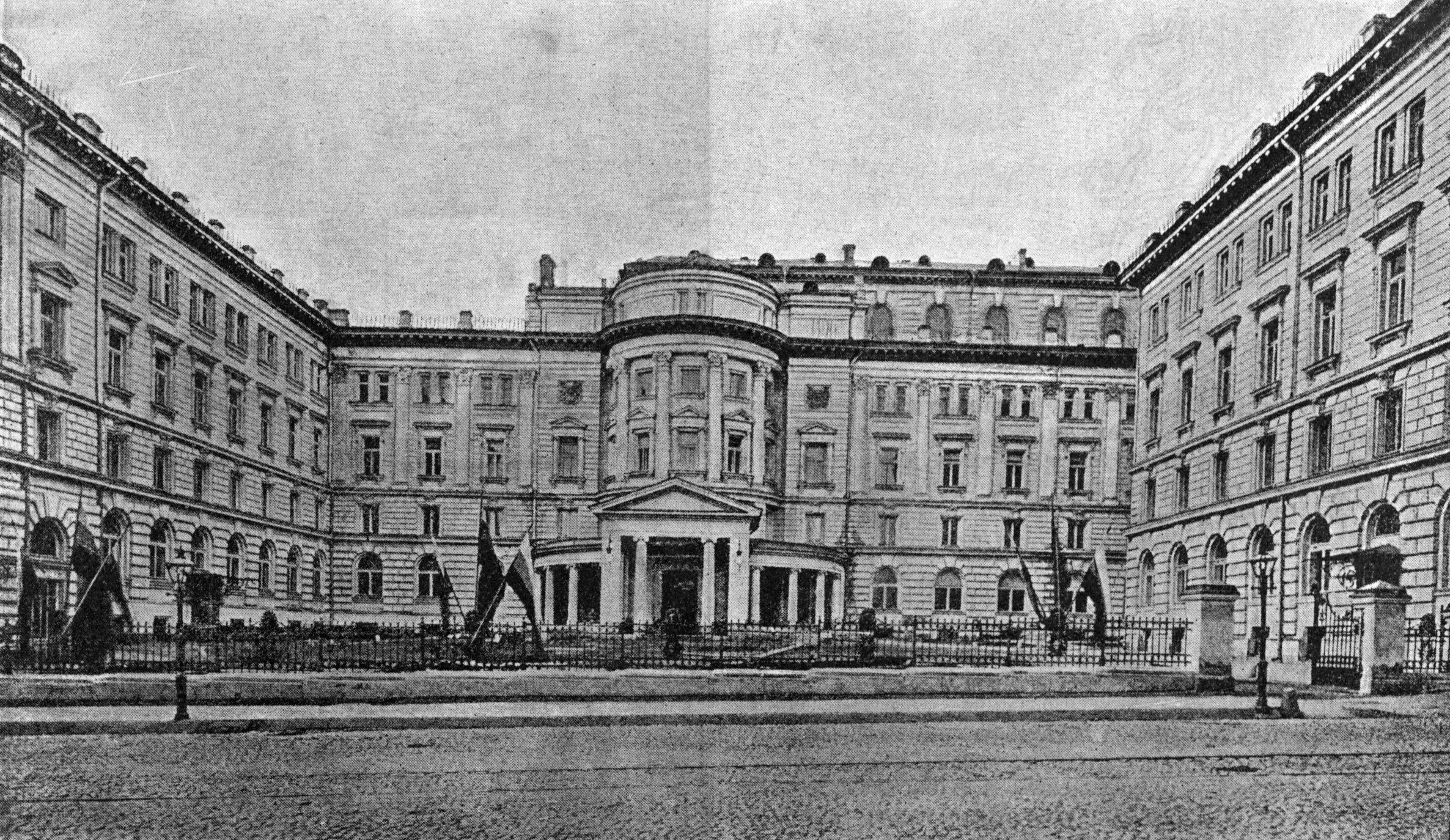 Здание консерватории в Москве